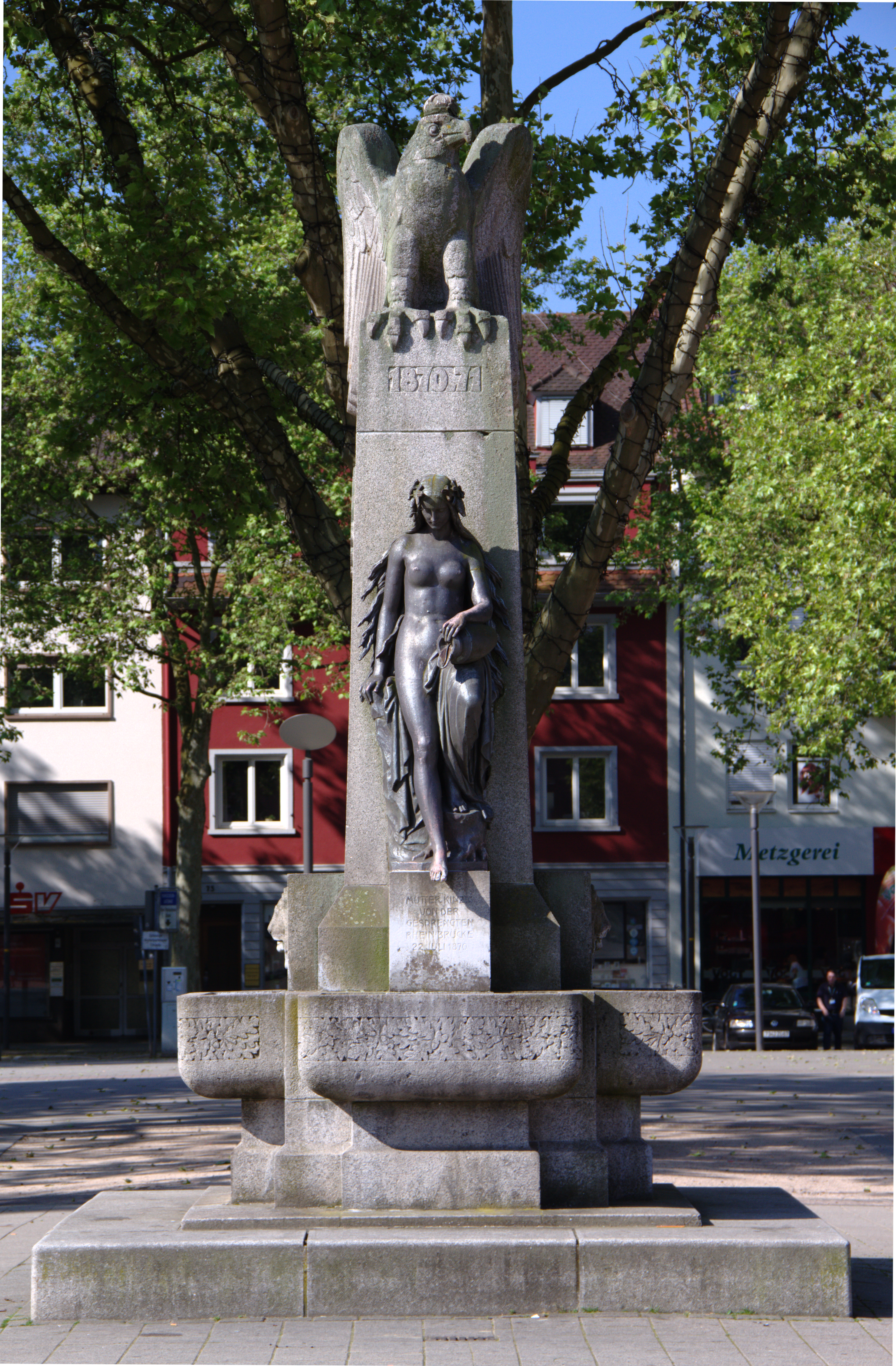 Kehl am Rhein : Mutter Kinzig de Franz Xaver Reich (1815–1881). Monument en mémoire de la guerre de 1870-71